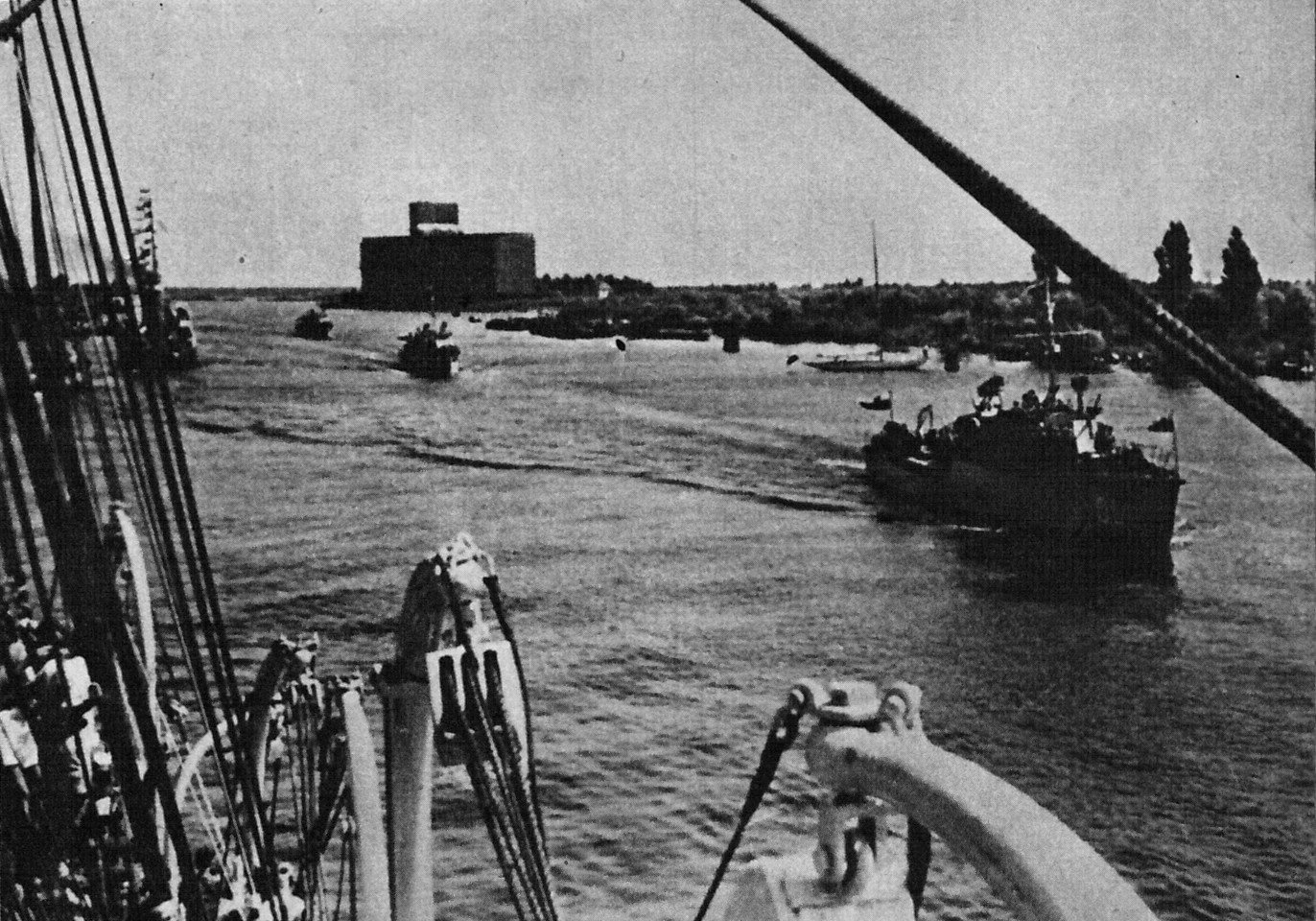 Trałowiec proj. 253Ł ORP "Orlik" w Szczecinie